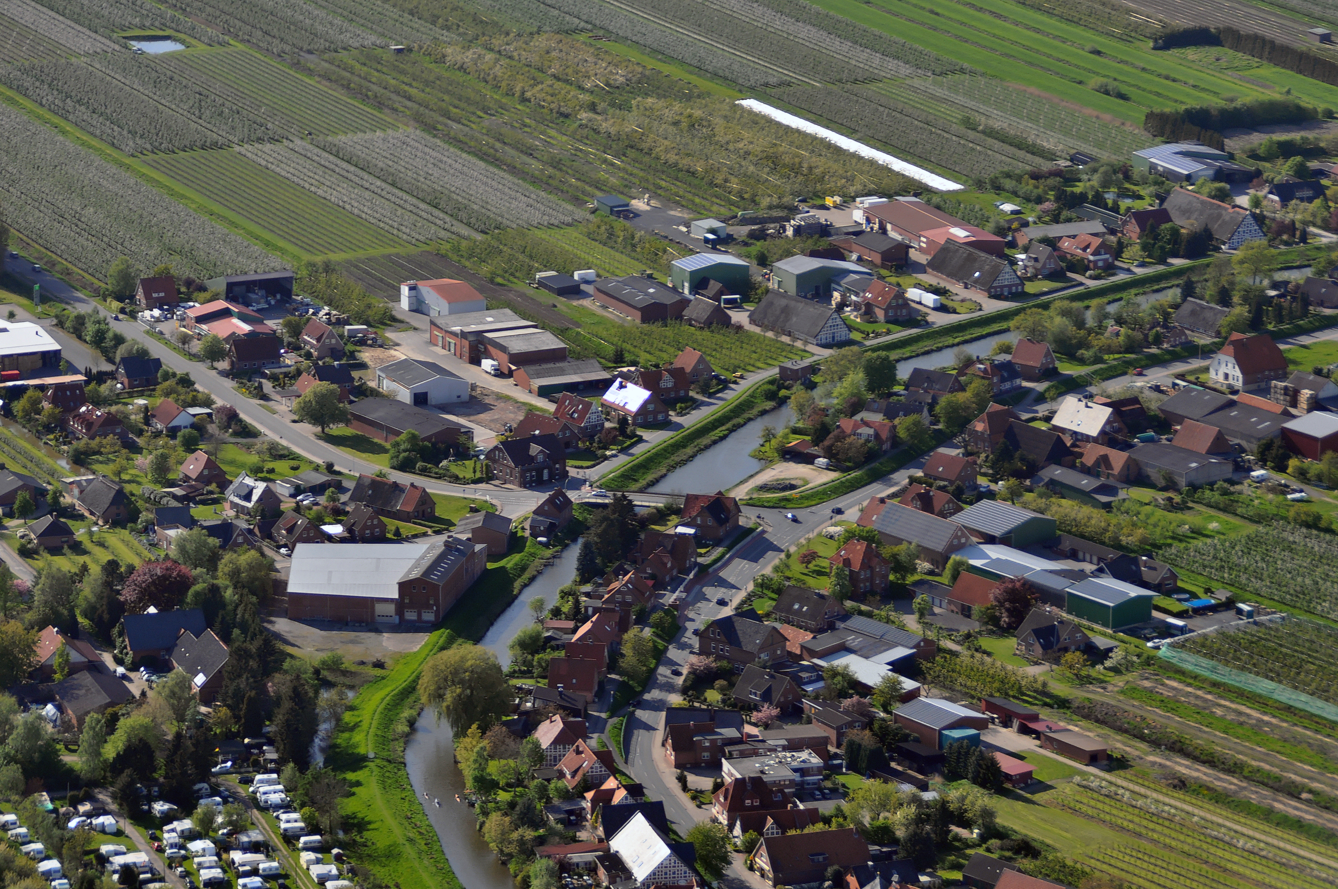 Luftbilder von der Nordseeküste 2012-05